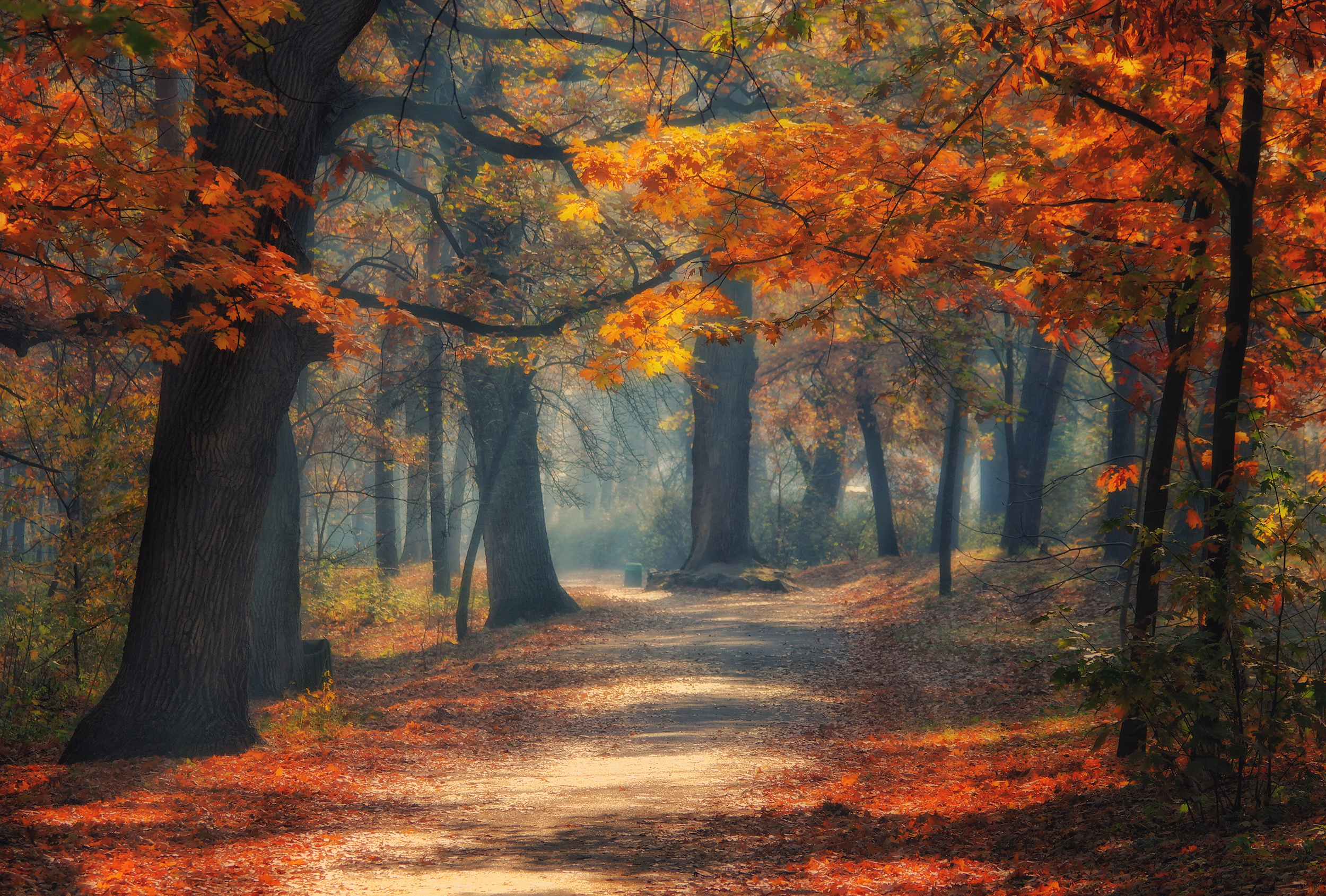 Черкаський міський парк "Сосновий бір" (кол.«Ювілейний», м. Черкаси